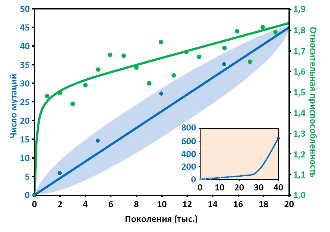 Рост числа фиксированных мутаций и приспособленности (скорости роста) бактерий популяции А-1 в эксперименте Ричарда Ленски. Голубая область – 95%-й доверительный интервал для числа мутаций. Точками обозначены экспериментальные данные, сплошными линиями - линии регрессии. На врезке предстален график количества мутаций для поколений 0—40 000. Видно резкое увеличение числа мутаций после поколения 26 000.